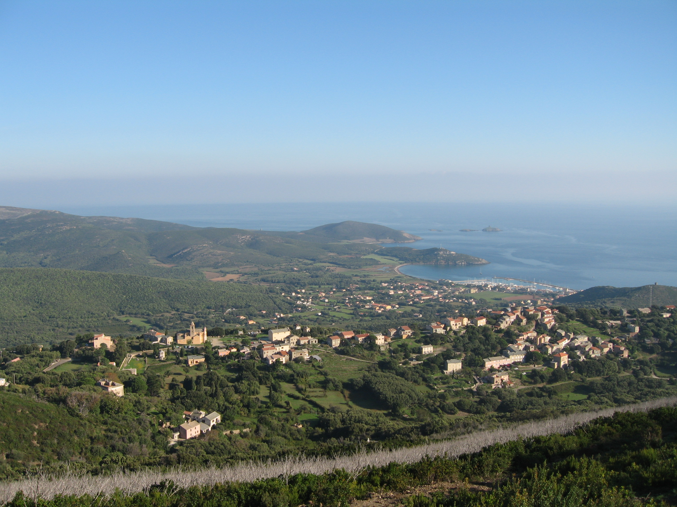 Le village de Tomino